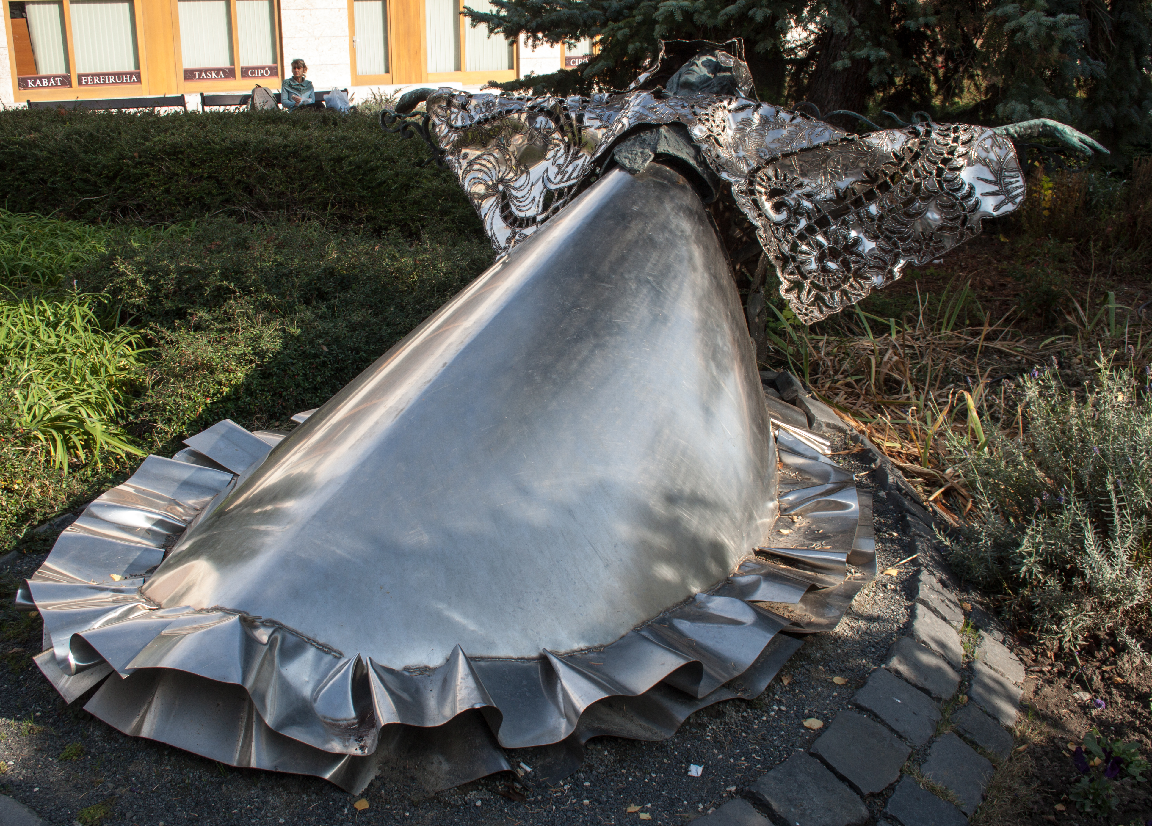 Female figure. Refer to Charles Baudelaire Une Charogne poem, replica